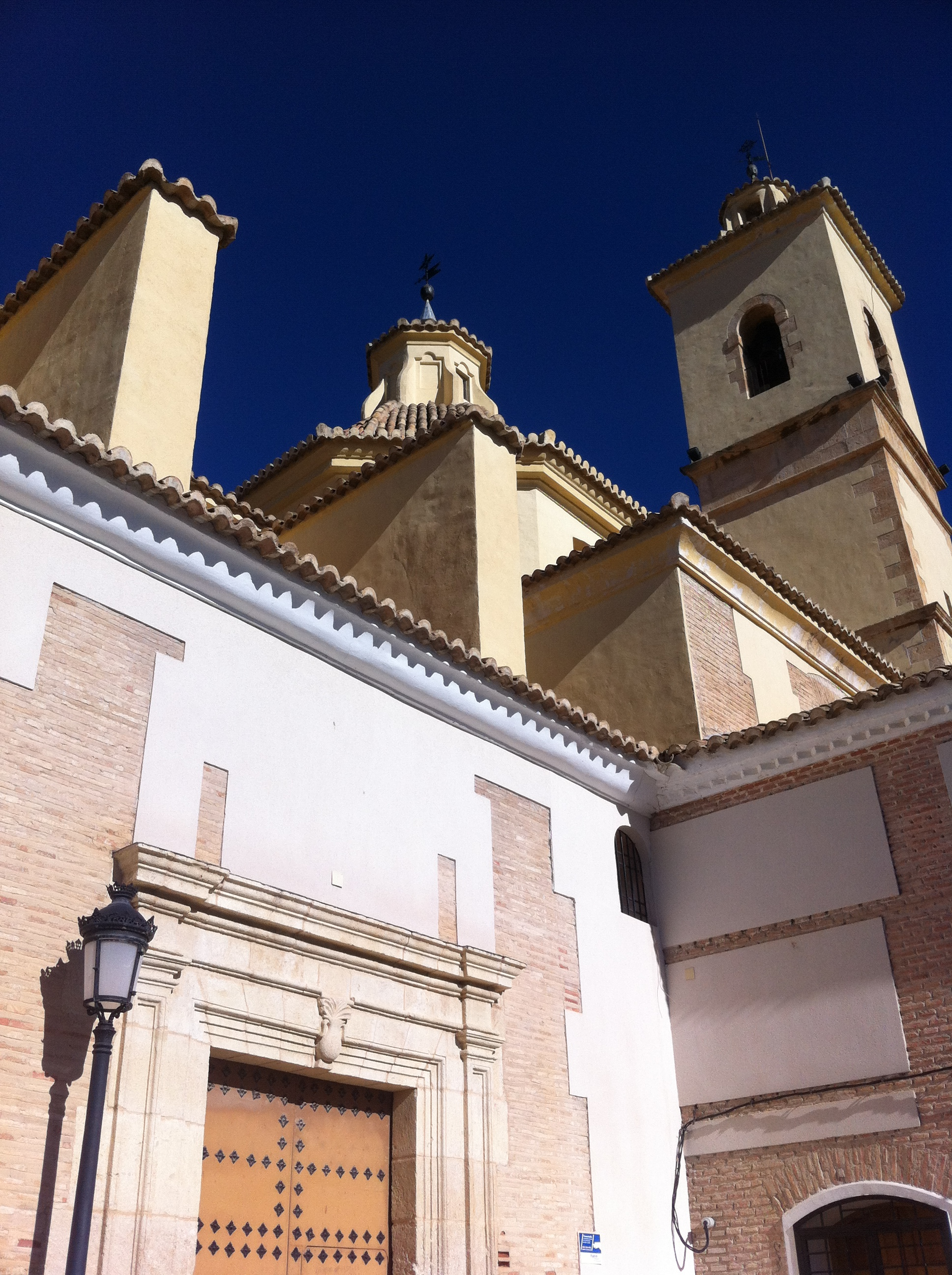 Detalle de la iglesia barroca de Ricote (Región de Murcia, España)